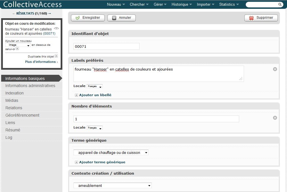 Ecran d'édition d'objets de l'application CollectiveAccess